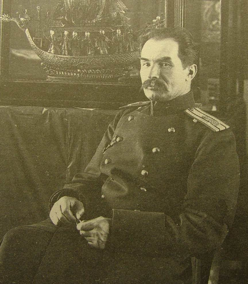 Путешественник Пётр Кузьмич Козлов в своём кабинете